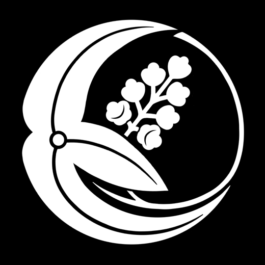 「一つ澤瀉の丸」紋（染抜）